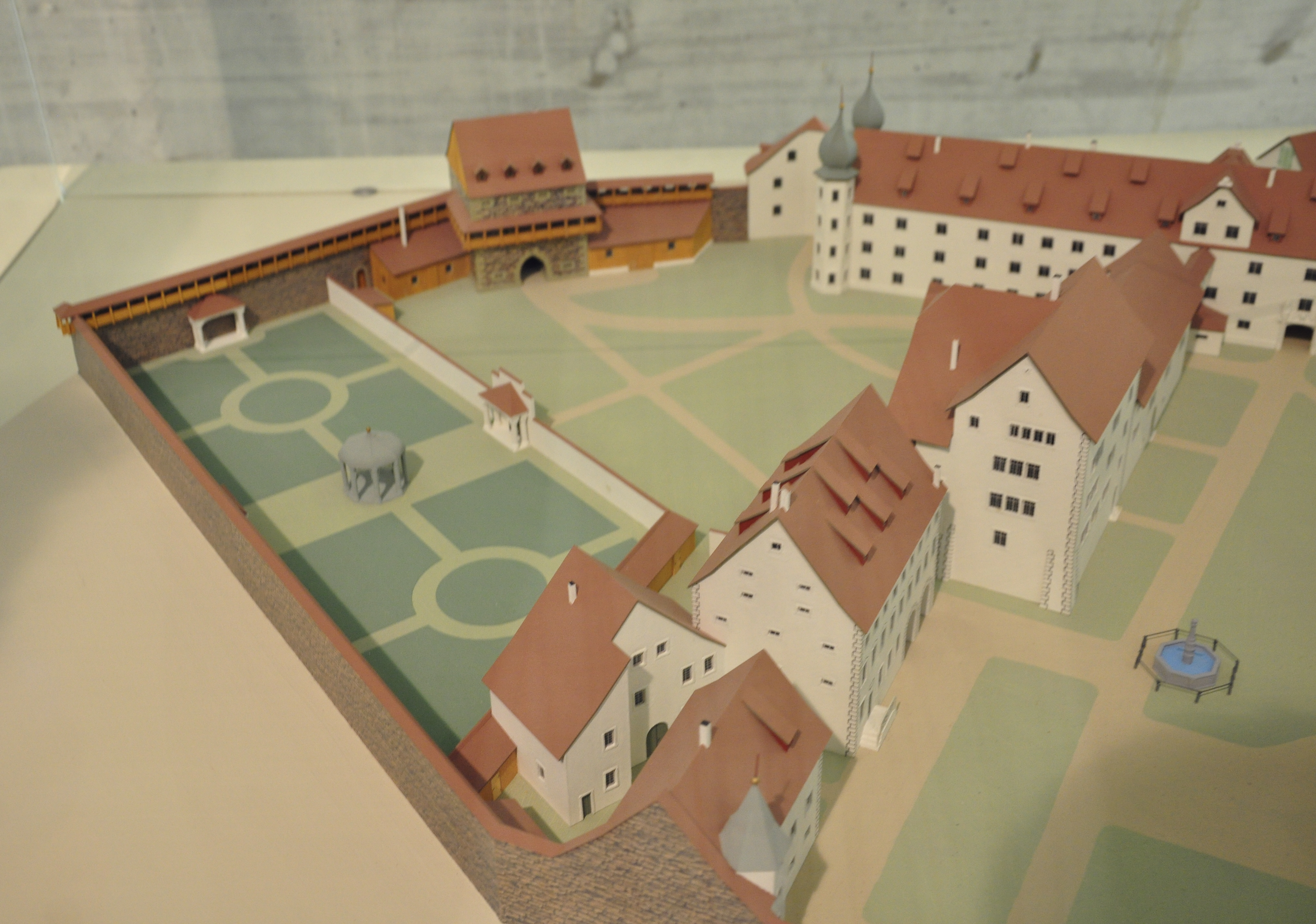 St. Gallen, Lapidarium, Modell des Stiftsbezirks St. Gallen um 1750, Modell von Mark Eisenhut